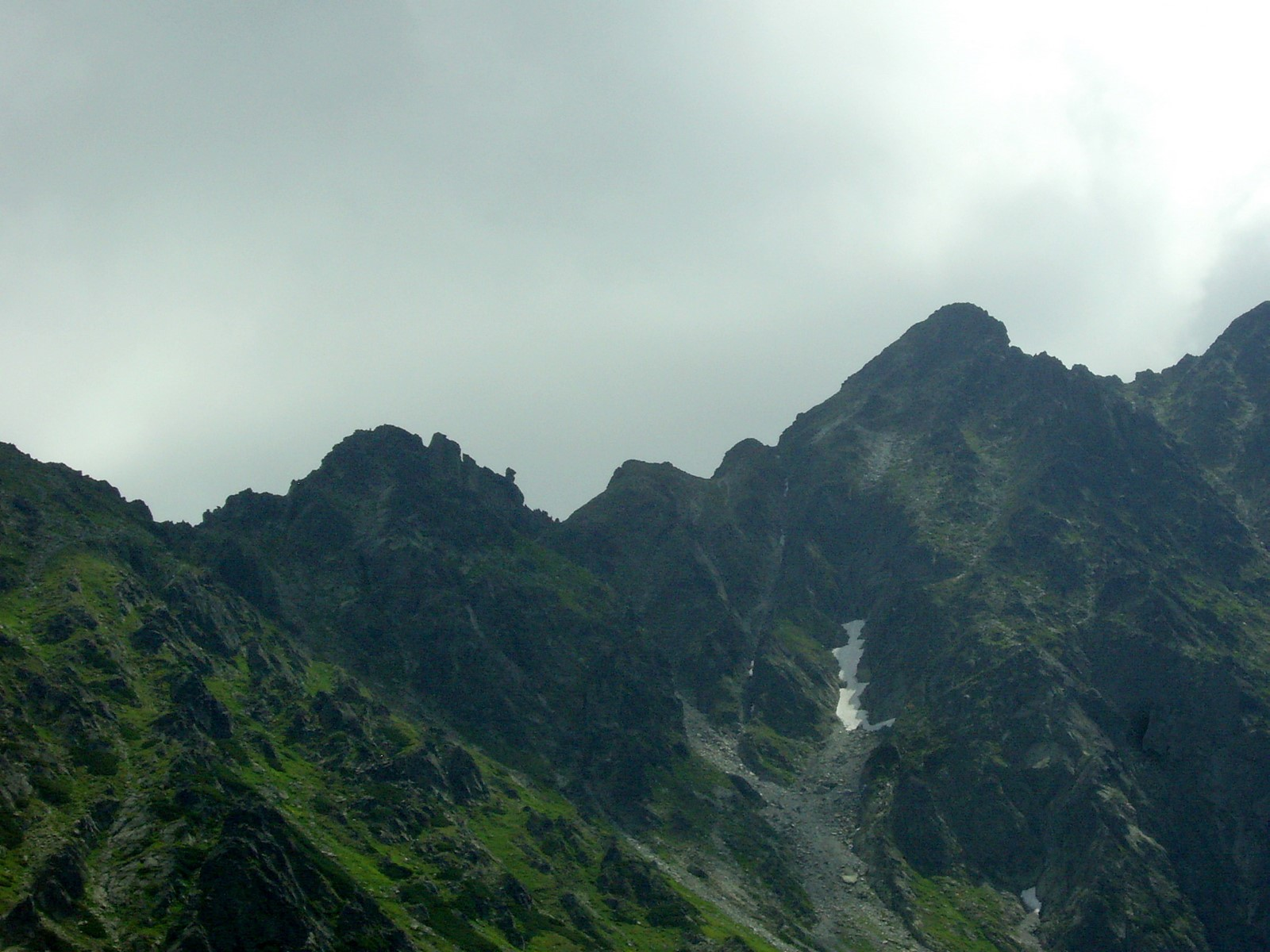 Wierch pod Fajki, Pańszczyckie Czuby i Skrajny Granat